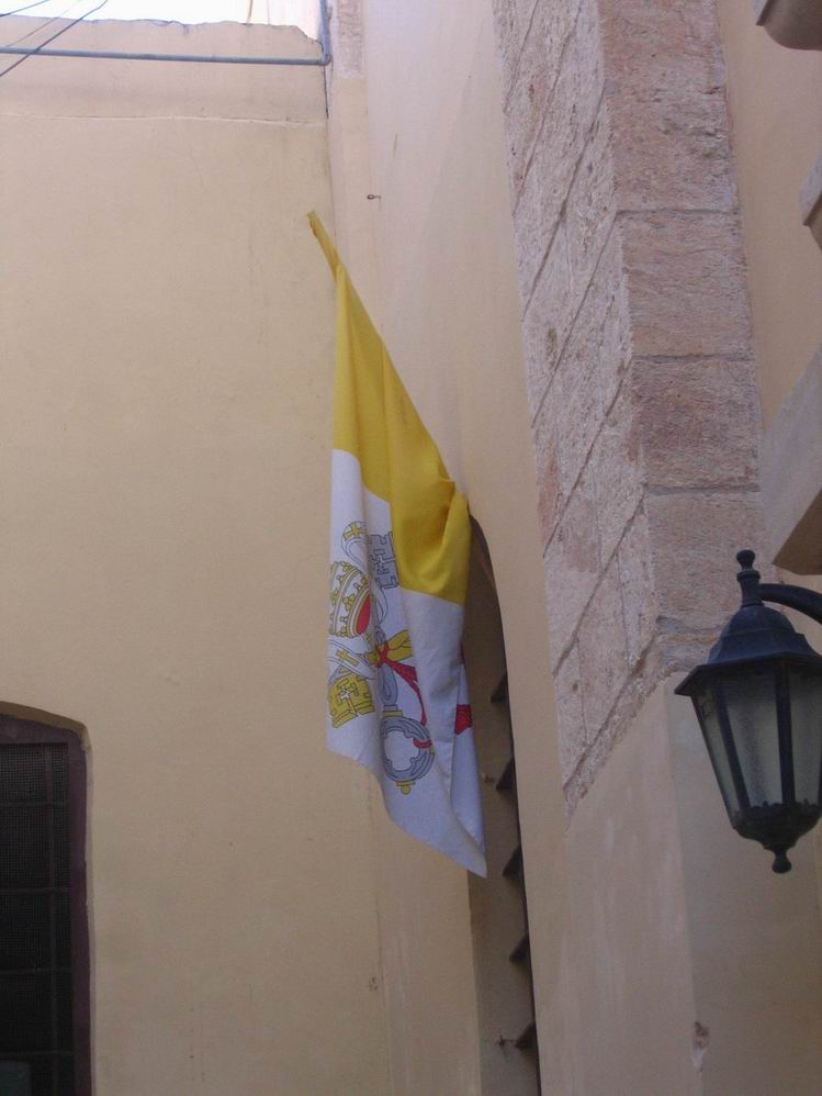 דגל הוותיקן בכניסה לכנסייה בנצרת. התצלום הוא שלי.